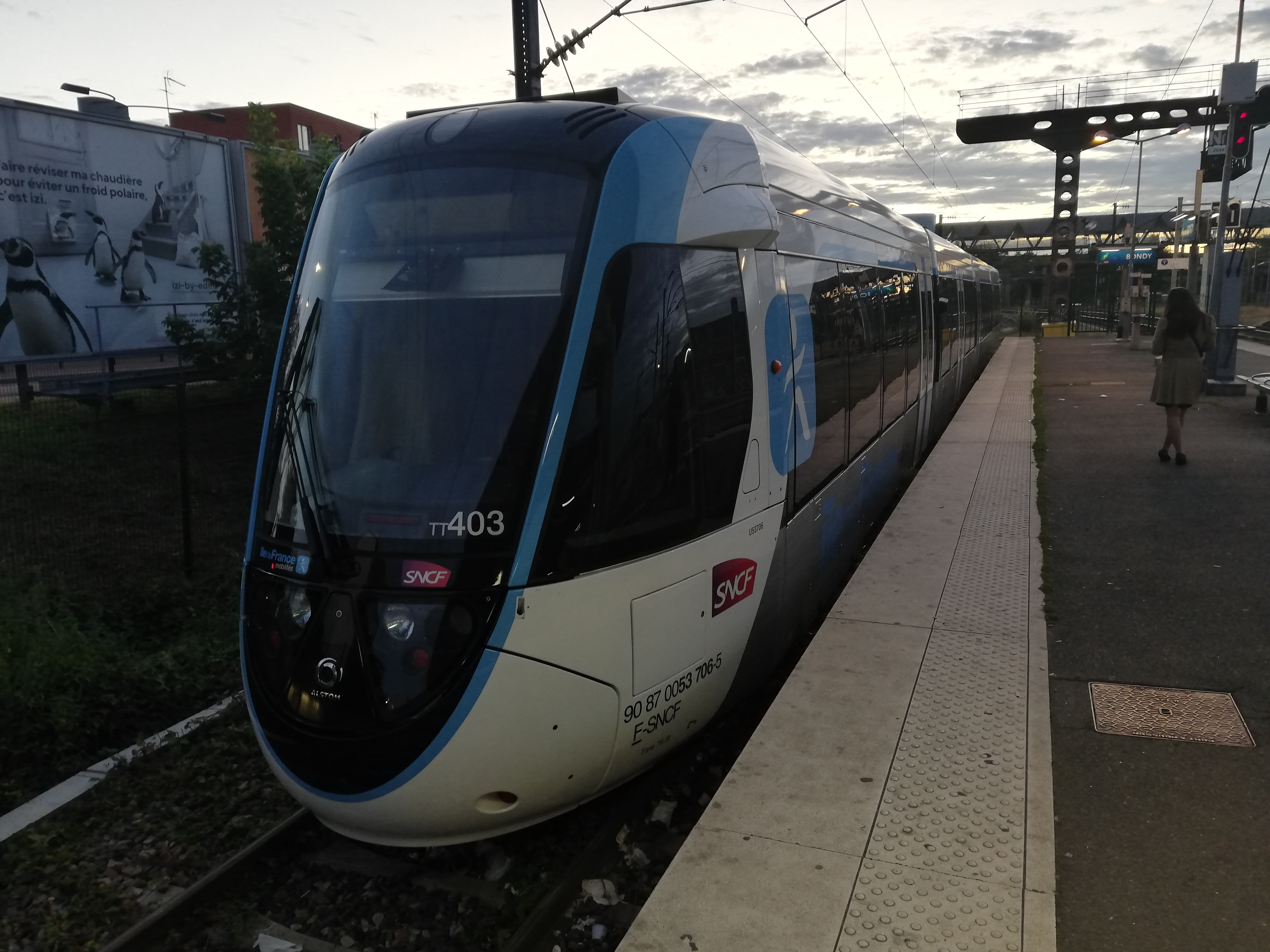 Un Citadis Dualis de la ligne 4 du tramway d'Île-de-France stationne dans un quai de la ligne E du RER vers Paris, en gare de Bondy, en 2019.